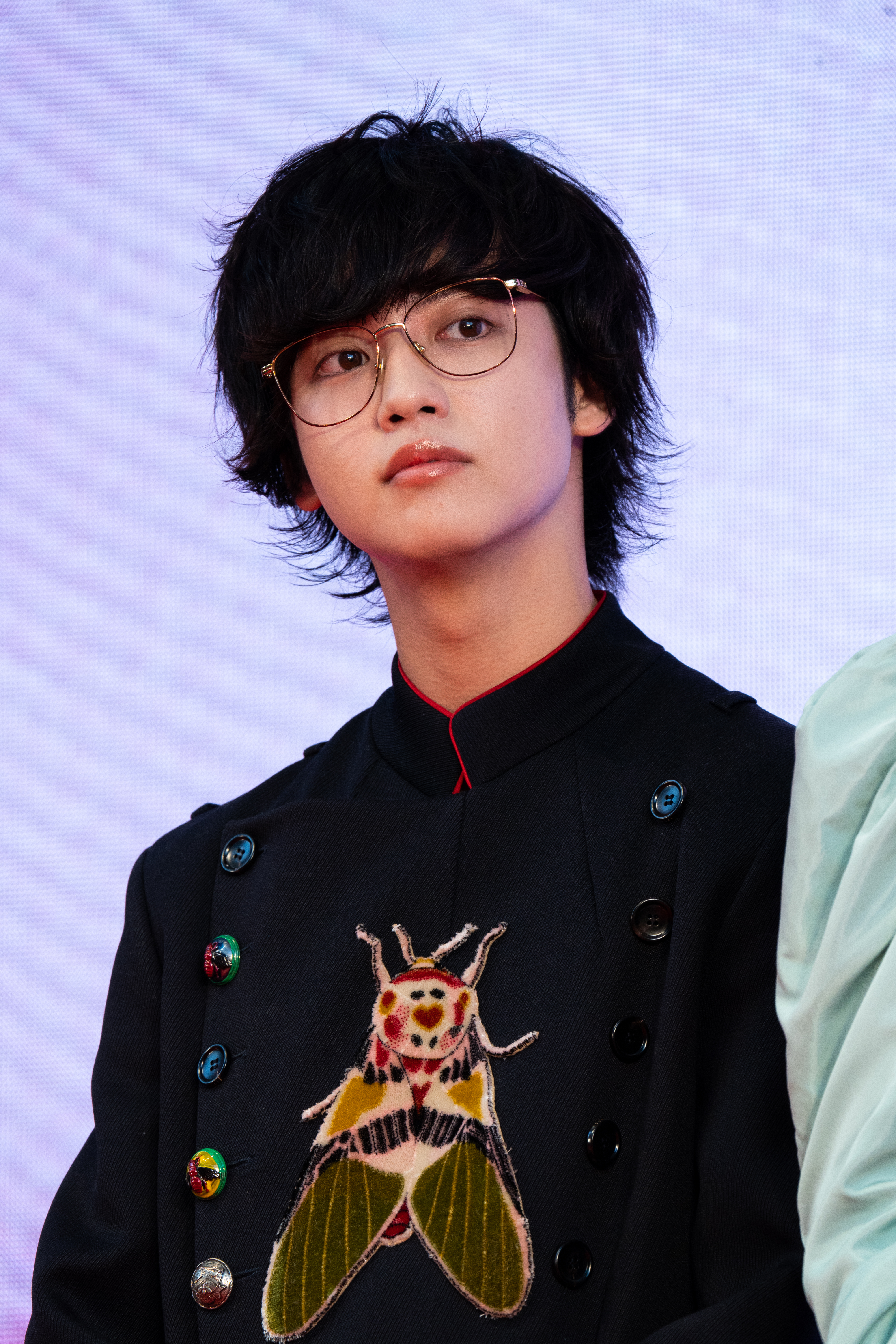 第32回 東京国際映画祭 オープニングセレモニー ゆうたろう (殺さない彼と死なない彼女)